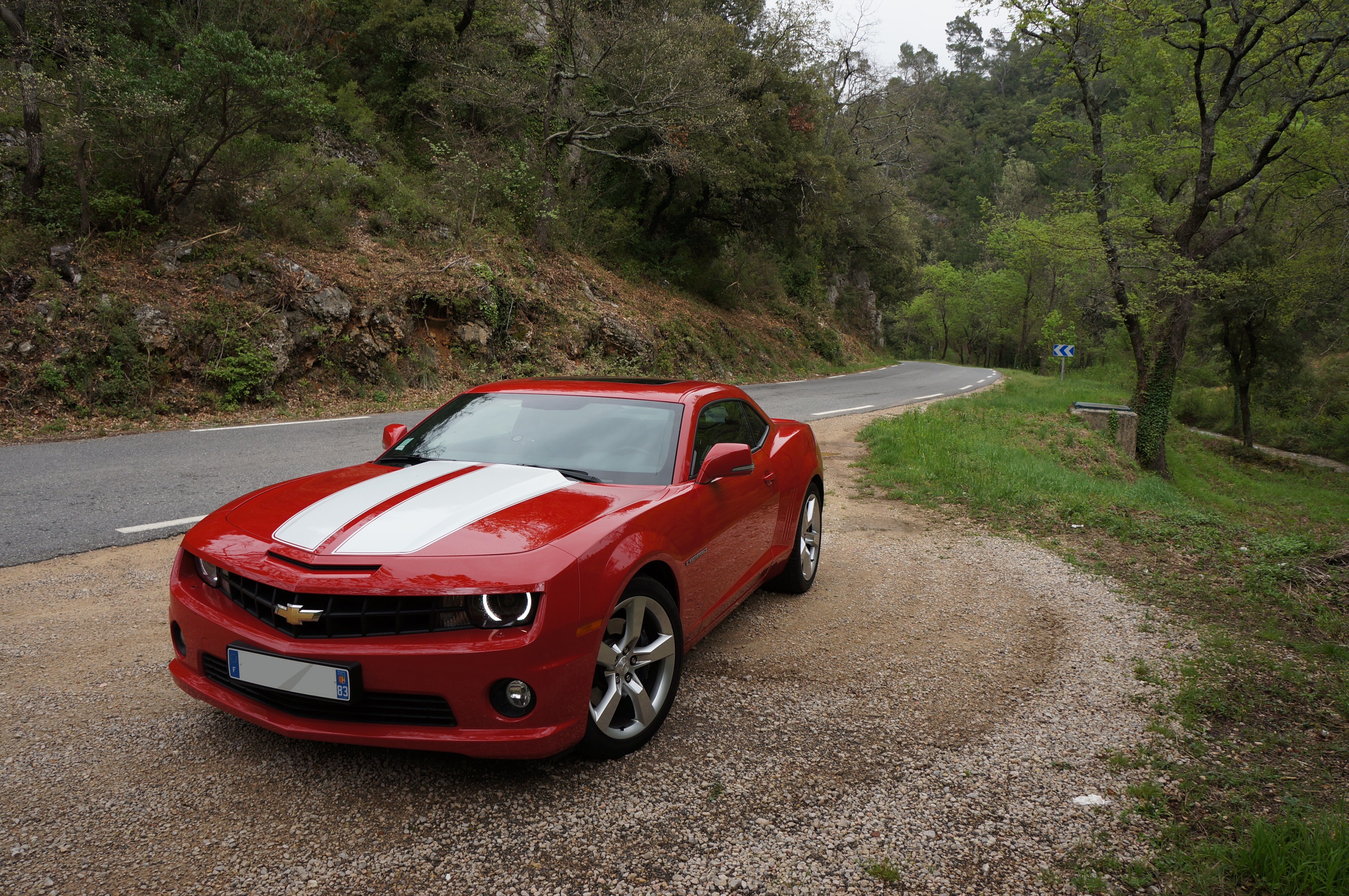 Camaro 2SS/Rs 2012 européenne